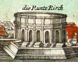 Excerpt from map from ca. 1650.